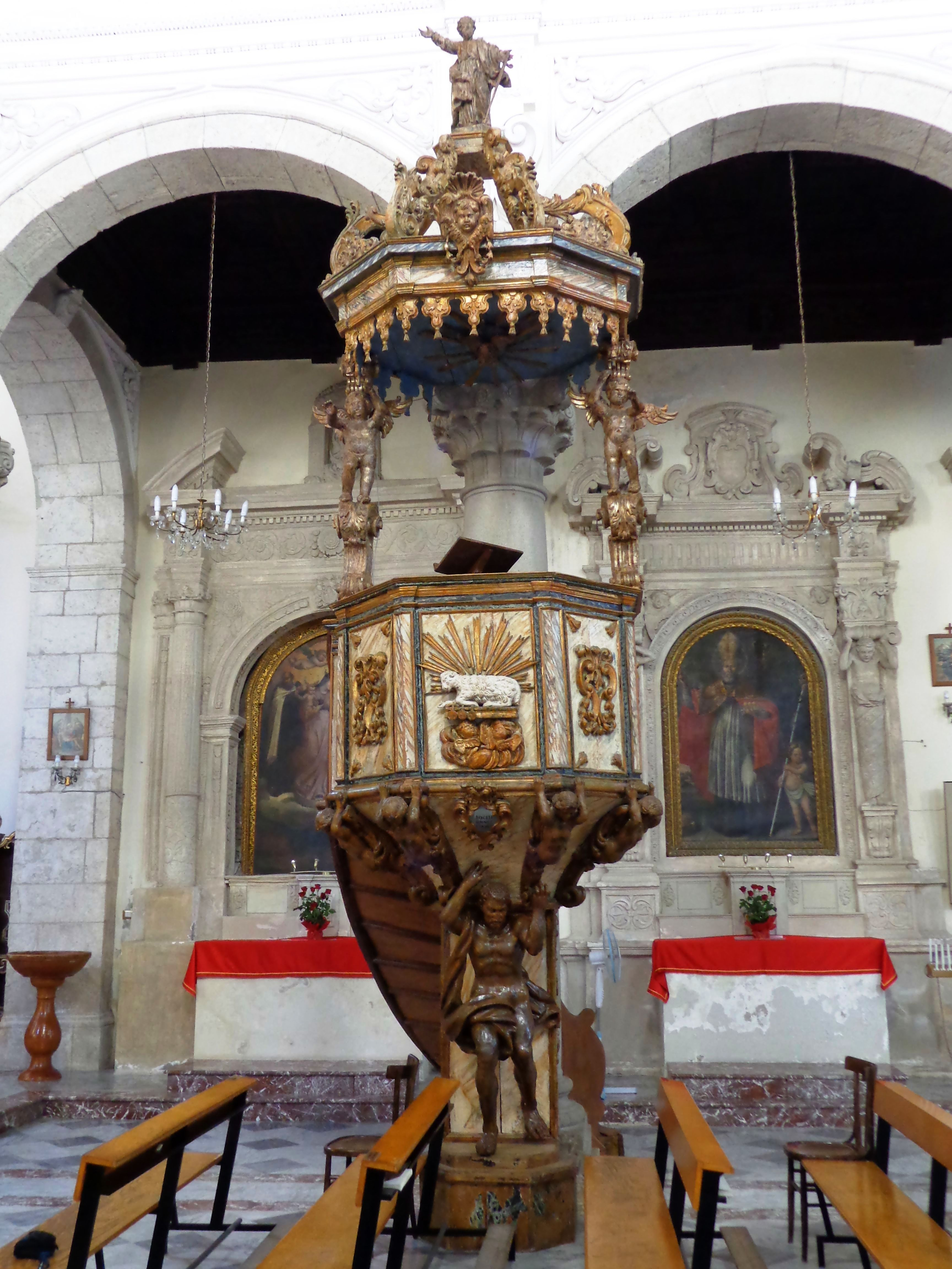 Duomo Condrò Pulpito